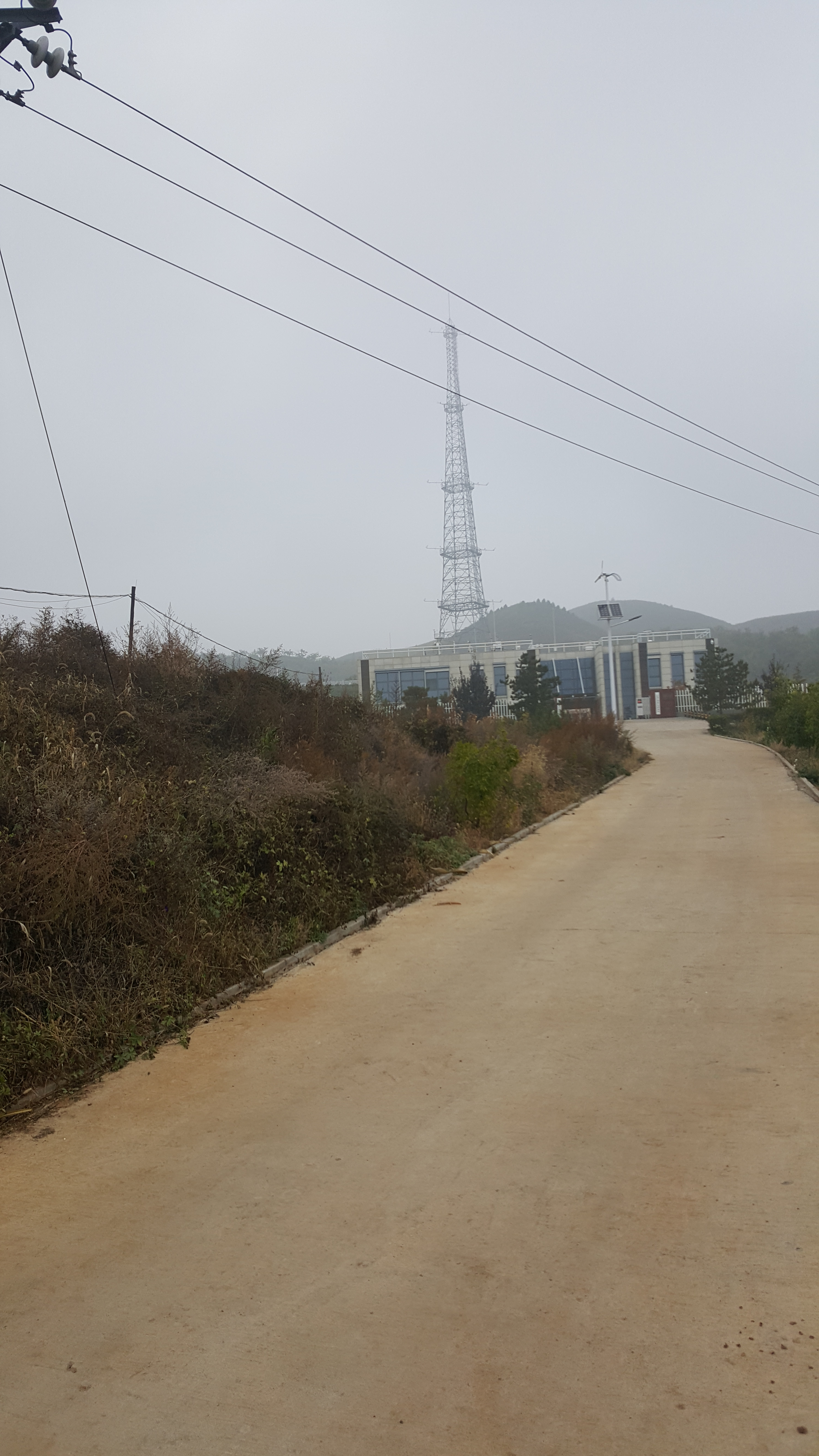 上甸子站位于北京市密云区高岭镇上甸子村，既是国家气象观测站，也是区域大气本底观测站。